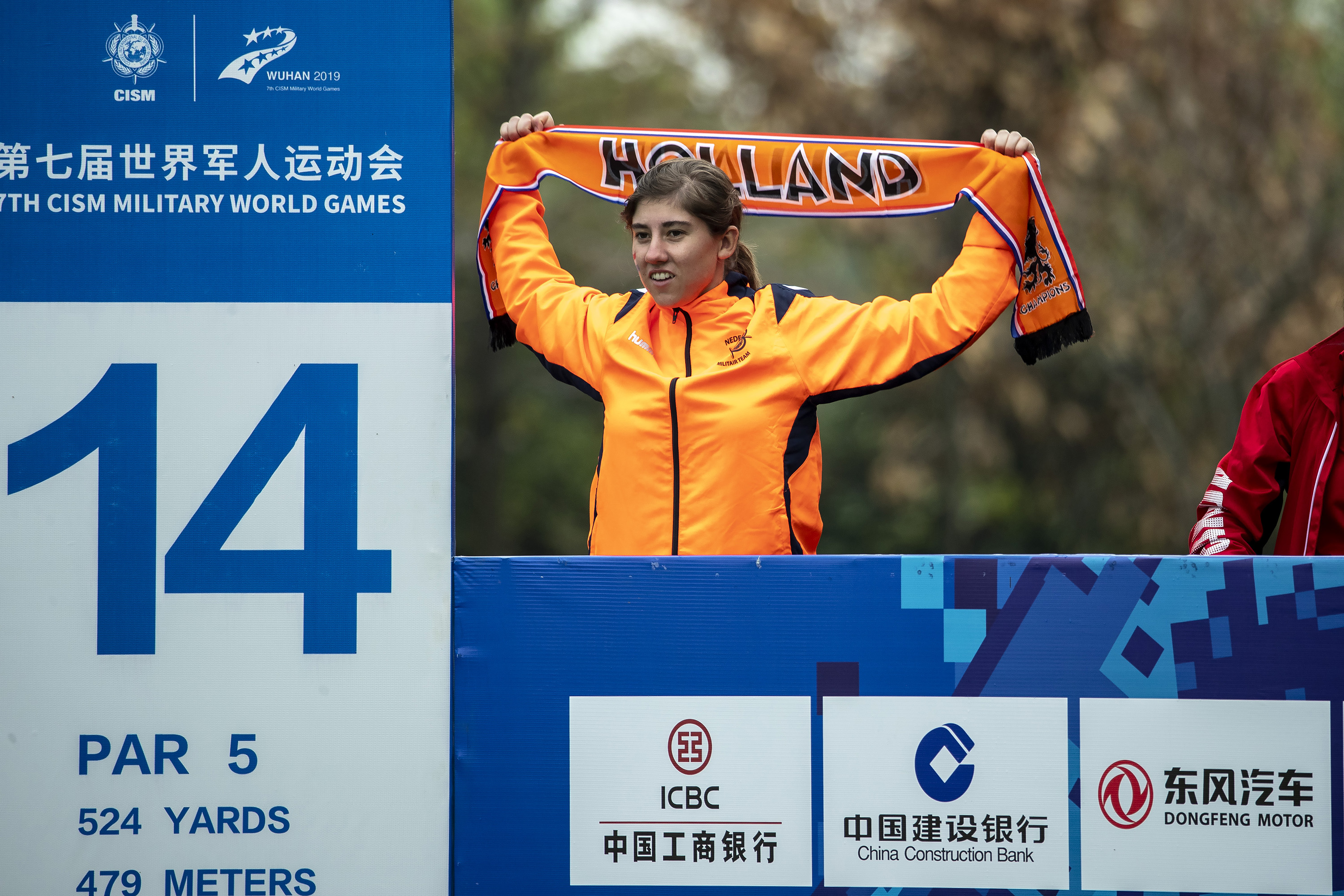 China, Wuhan, 23 oktober 2019.Militaire wereldspelen in China, van 17 tot 29 oktober.Ongeveer 10.000 atleten uit 105 landen (onder wie ca 160 Nederlanders) nemen deel aan dit evenement.Foto: Finale golf mannen.